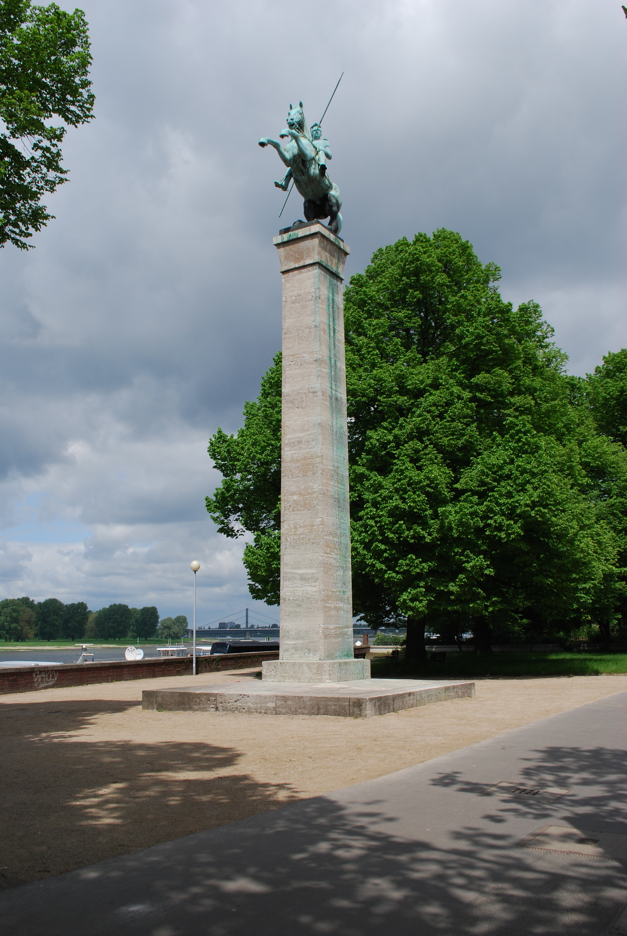 Vue du monument sur le quai Joseph Beuys à Düsseldorf.